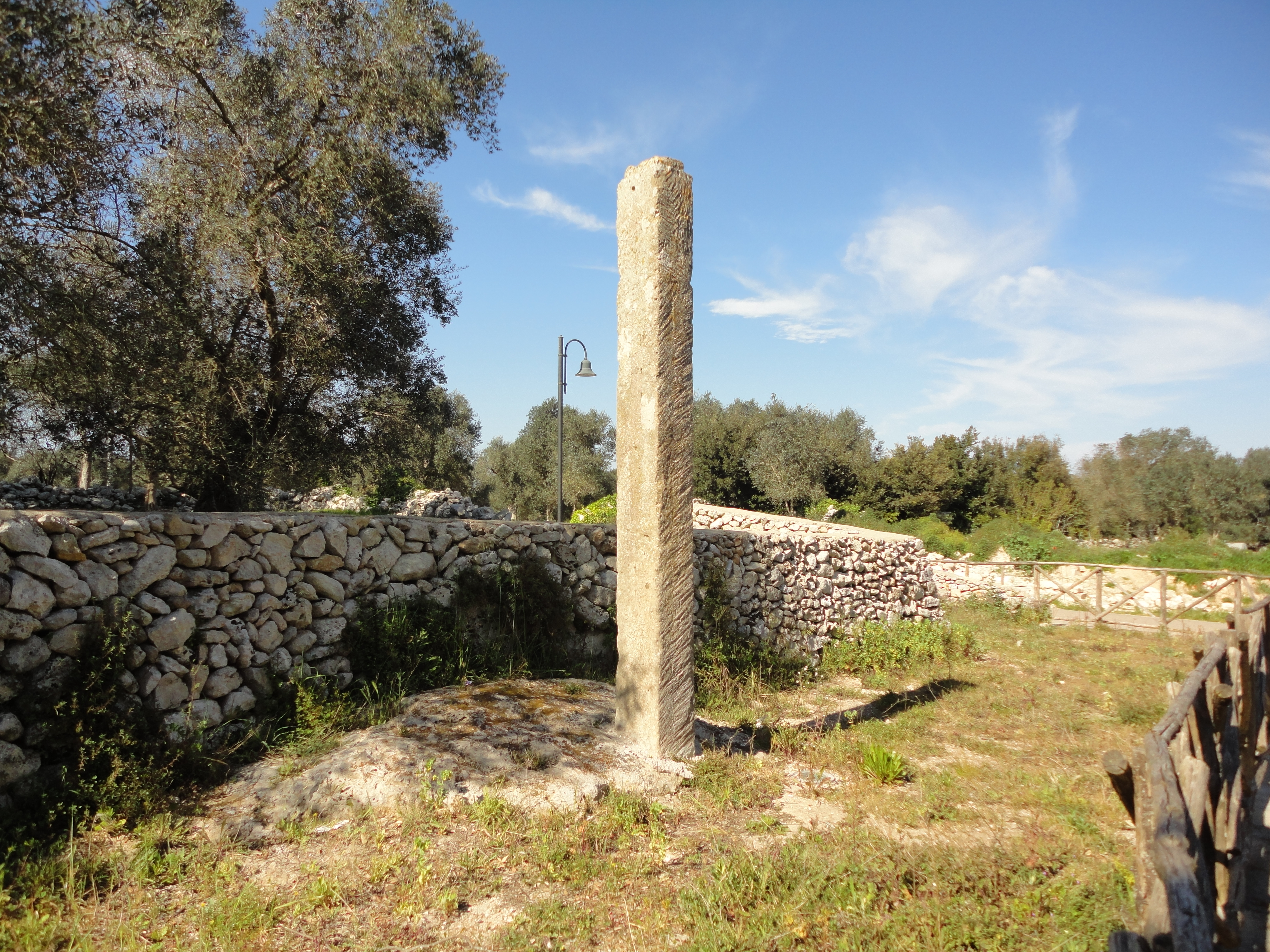 Menhir Vicinanze 2 Giurdignano